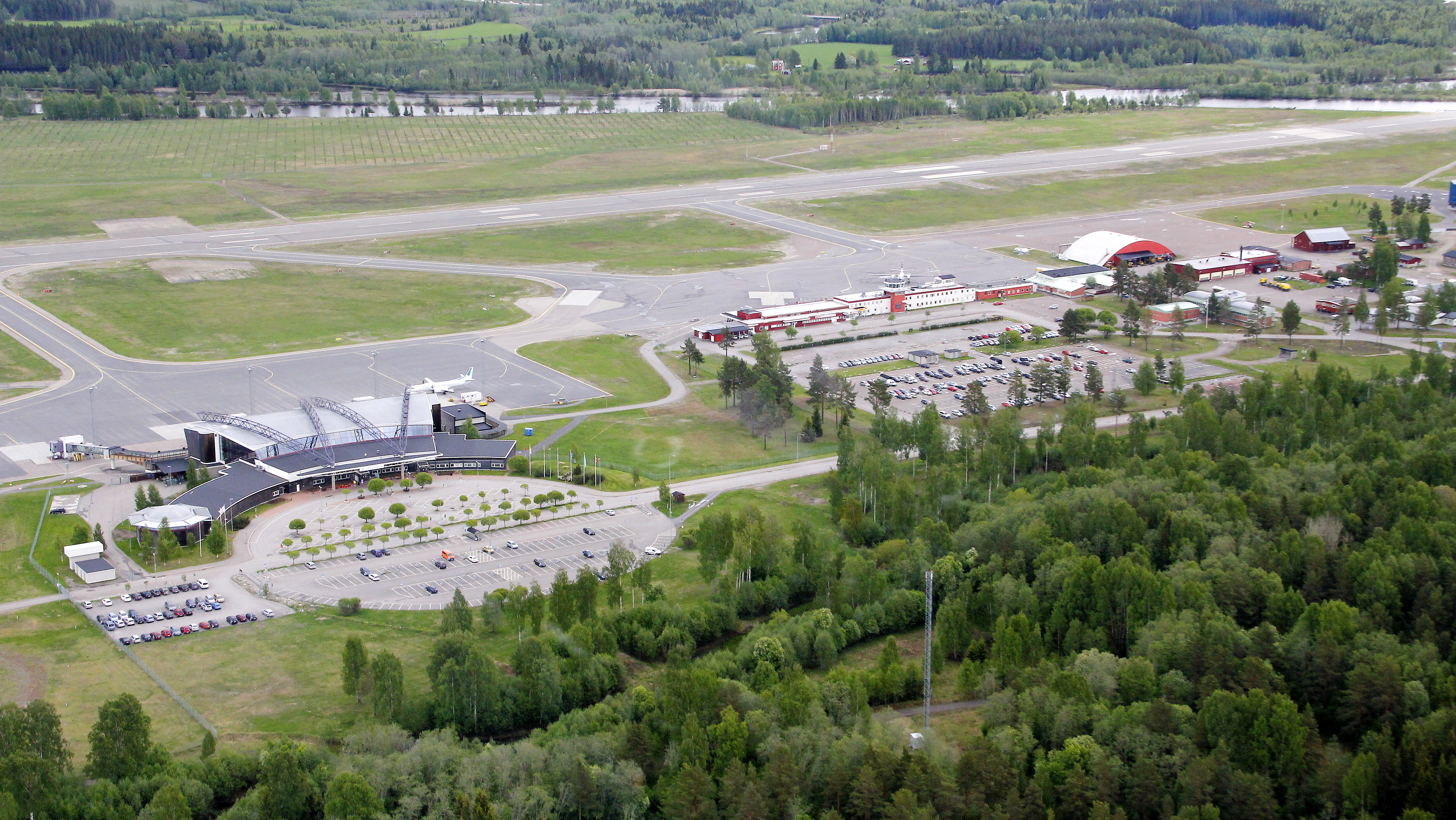 Sundsvall/Härnösand/Timrås flygplats Midlanda i Timrå kommun.